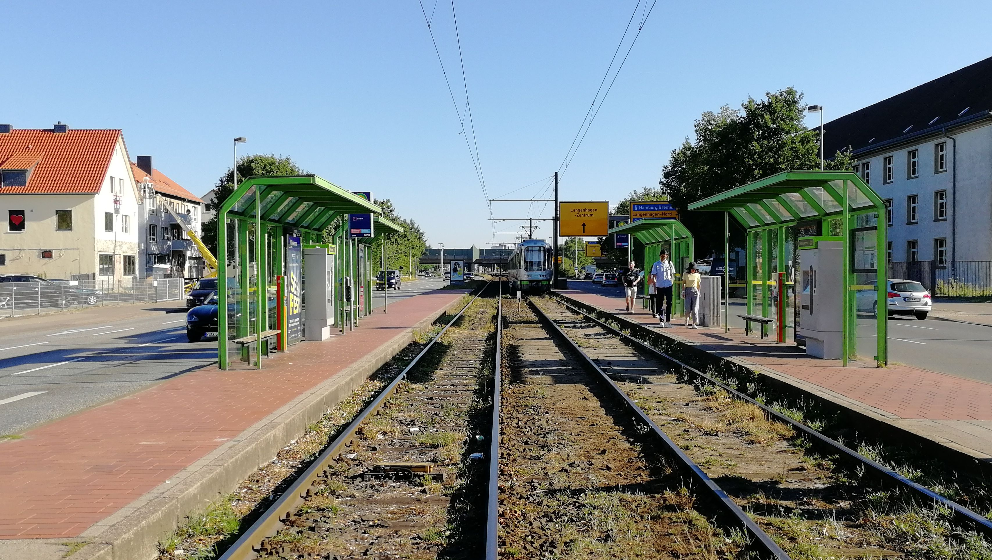 Stadtbahn Hannover, Haltestelle: Wiesenau